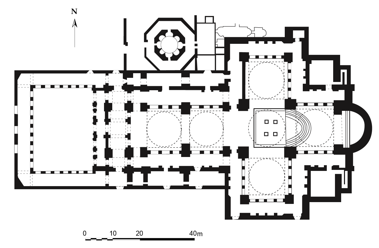 Plan de l'église Saint-Jean le Théologien. Dessin sous Adobe Illustrator d'après le plan dans C. Foss, Ephesus after Antiquity, Cambridge, 1979.